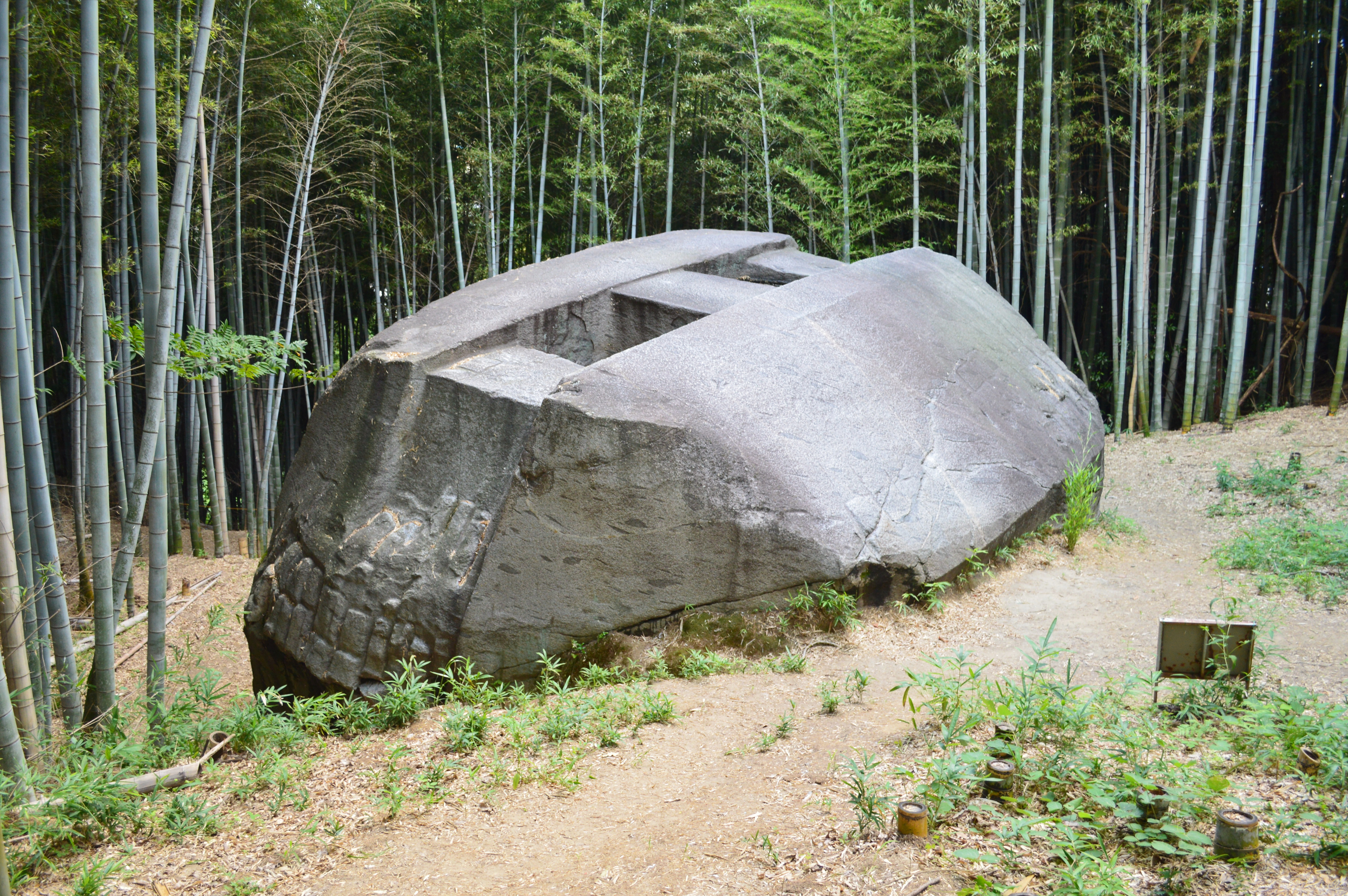 益田の岩船 西面